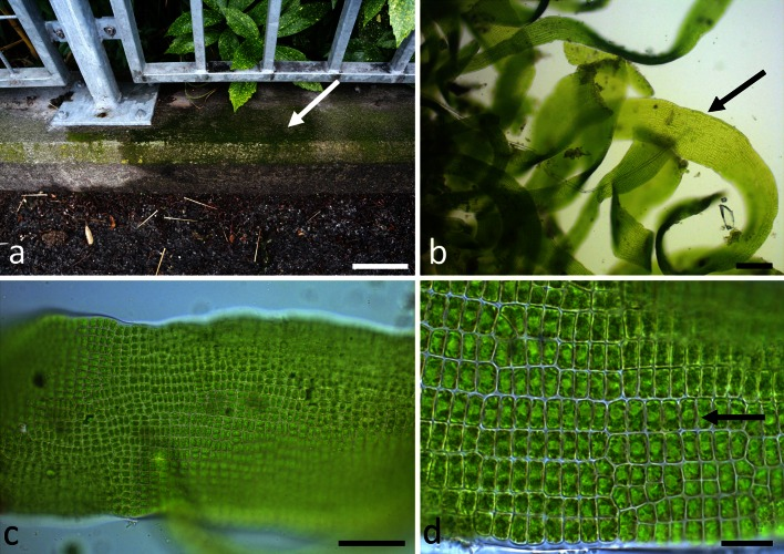 Habitat et morphologie de l'algue verte terrestre Prasiola calophylla. a développement de l'algue sur un mur en béton (flèche); b aperçu des frondes (flèche) ; c morceau de thalle individuel (~ 160 µm de large) ; d cellule végétale du thalle (flèche). Barres 10 cm (a), 100 μm (b), 50 μm (c) et 20 μm (d)